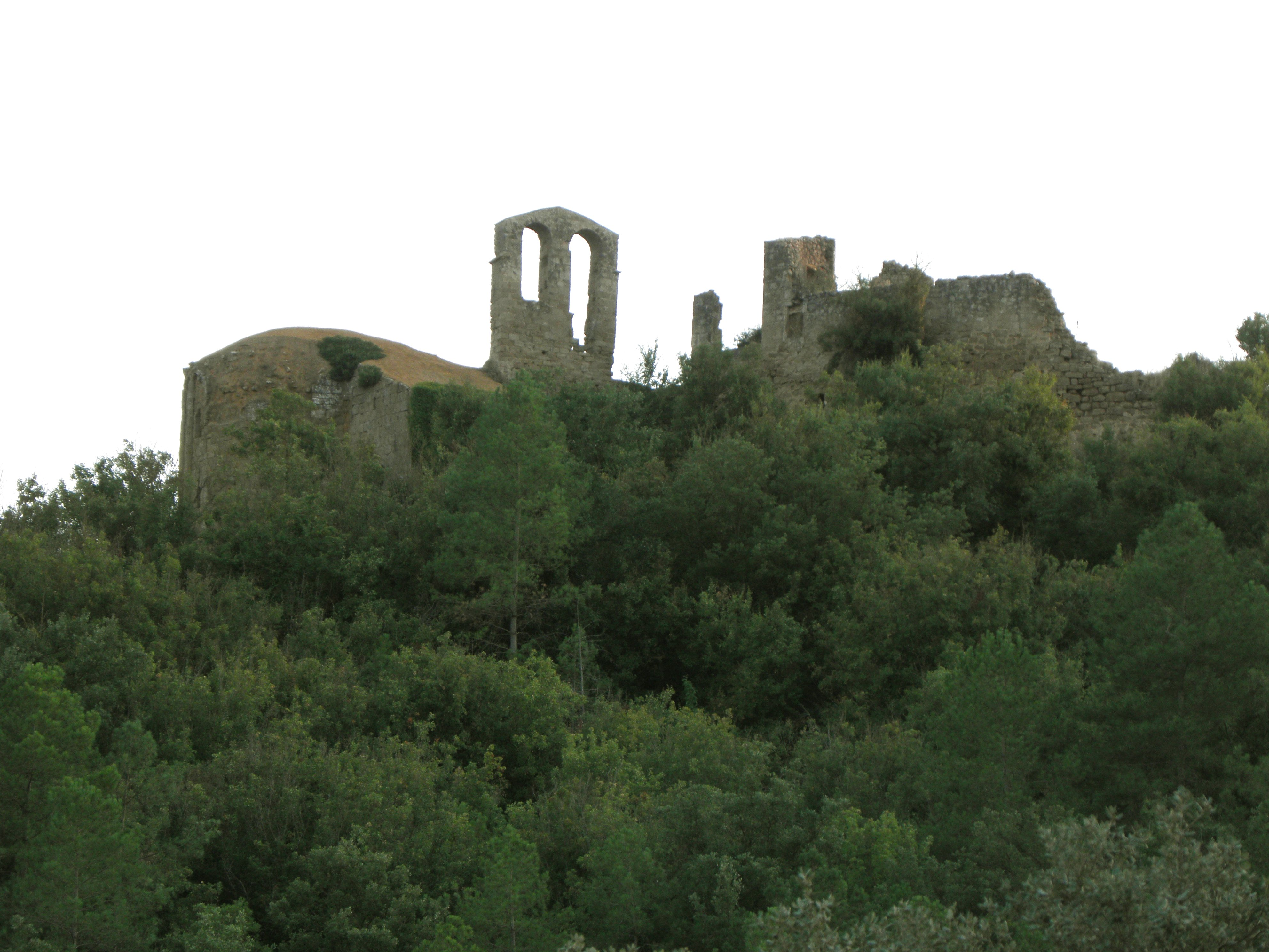 El conjunt de l'església romànica i el castell vist des del nord-est